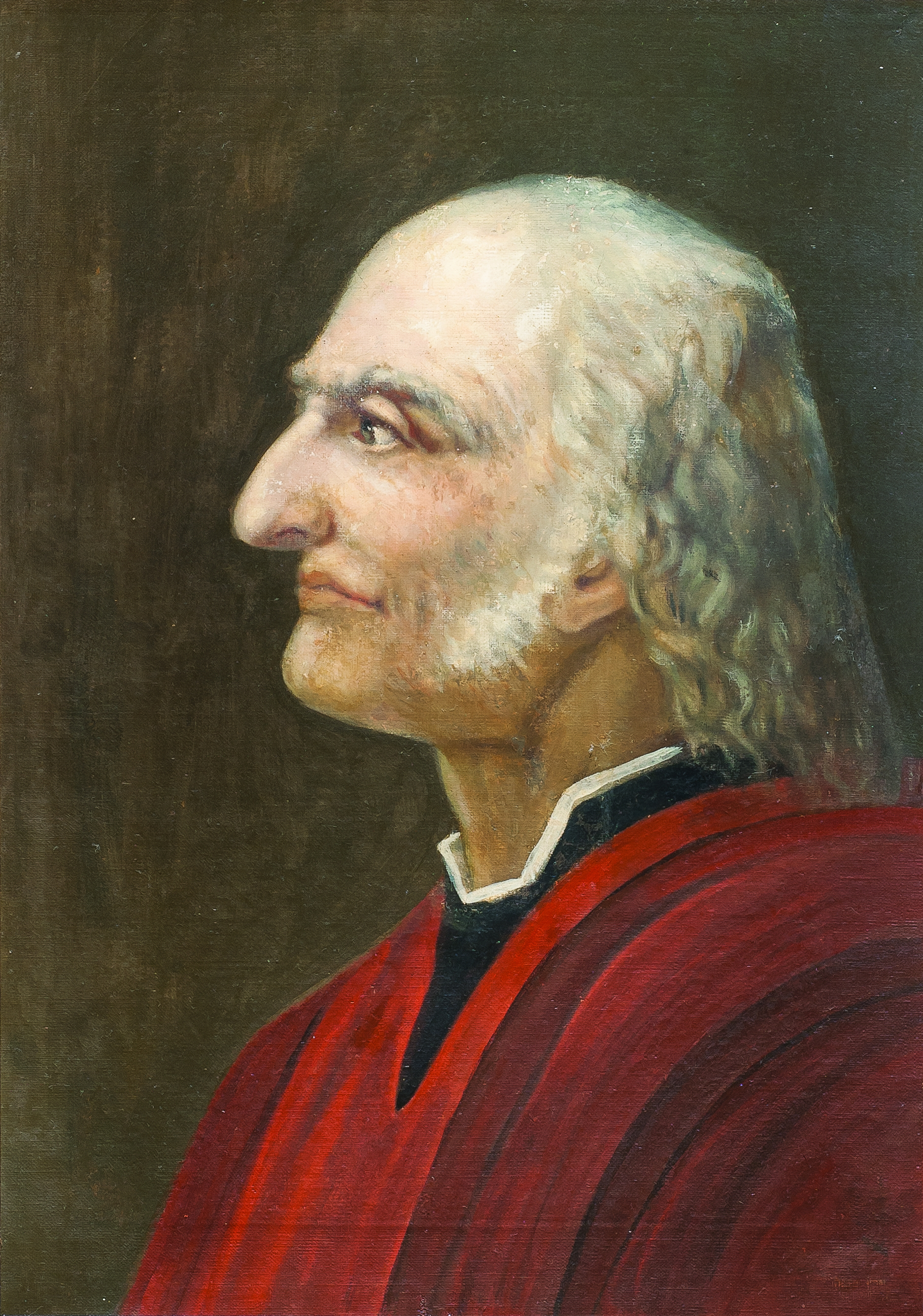 "José Artigas", óleo sobre tela con bastidor de madera de la pintora uruguaya Carmen Arraga de Sardeson (1840 - ?). Uno de los retratos al óleo más antiguos de José Gervasio Artigas realizado por un pintor nacional quien en este caso fue también una de las primeras mujeres artistas en la historia del arte del Uruguay.